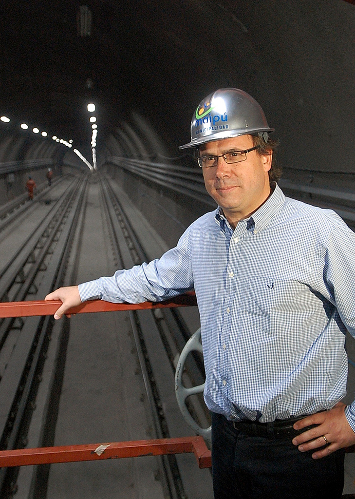 El entonces alcalde de Maipú, Alberto Undurraga, inspeccionando las obras del Metro en la comuna de Maipú.